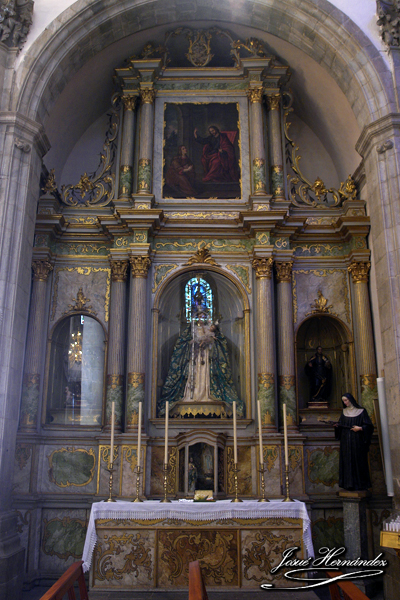 Retablo de Nuestra Señora de la Candelaria, siglo XIX Anónimo. Parroquia de Nuestra Señora de La Concepción